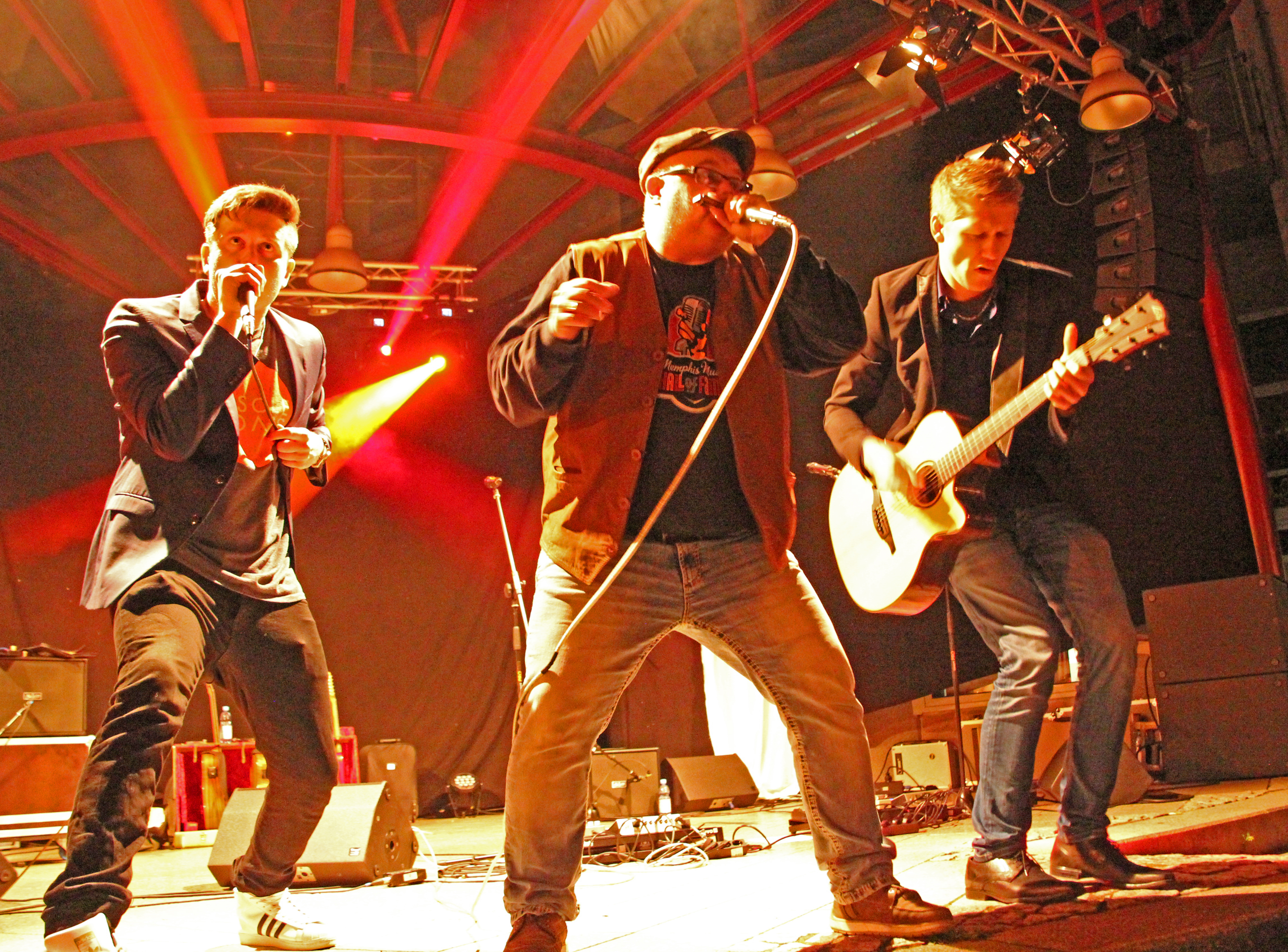 Bildinhalt: Chris_Kramer & Beatbox 'n' Blues bei den 22. Jazztagen Idar-Oberstein 2017. Aufnahmeort: Idar-Oberstein, Deutschland Die dargestellten Personen wurde bei einem öffentlichen Auftritt fotografiert.